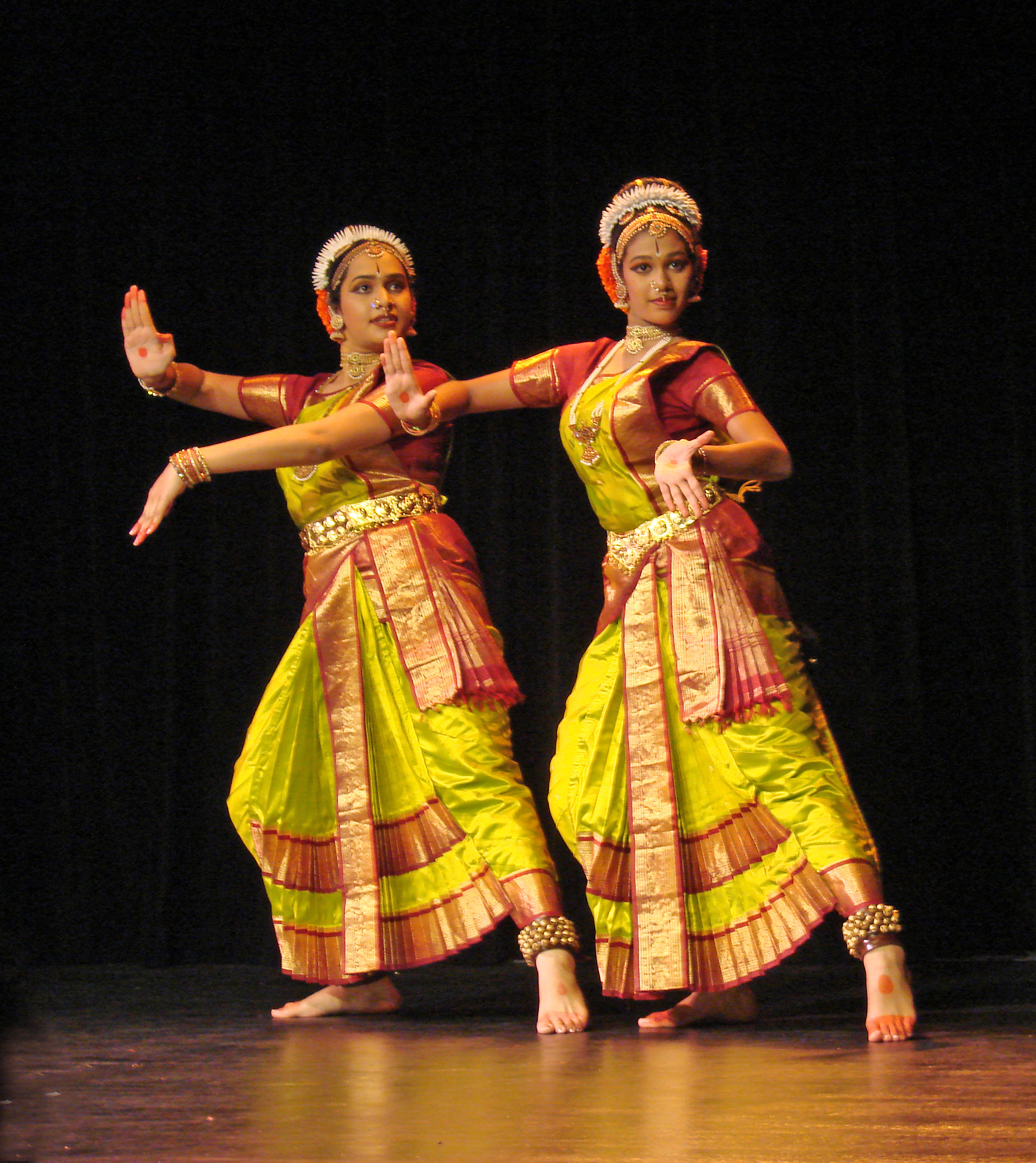 Spectacle de danse Kuchipudi, organisé par le service de l'auditorium du musée Guimet en coproduction avec Triveni, présenté le samedi 19 avril 2008, dans l'auditorium du musée Guimet à Paris par : "Deepika Reddy et ses musiciens" Les danseuses : Mihira Pathuri (à gauche) et Pooja Reddy (à droite) Sur la photo, les deux danseuses de la compagnie de Deepika Reddy. Ces deux jeunes artistes font partie de Deepanjali, l'institution fondée en Inde par Deepika Reddy et qui est dédiée à l’excellence de la pratique du Kuchipudi.